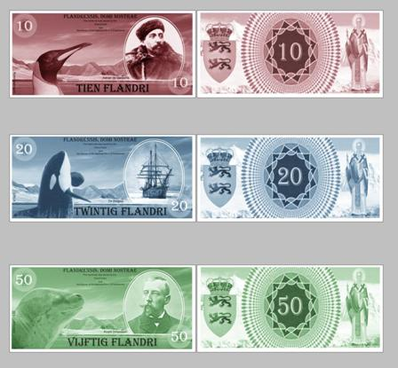 Валюта Великого Герцогства Фландренсис